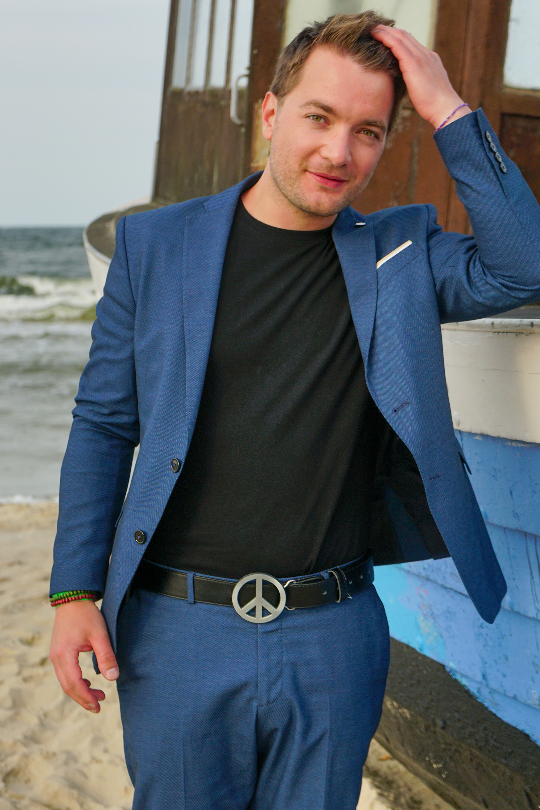 Tim Gernitz